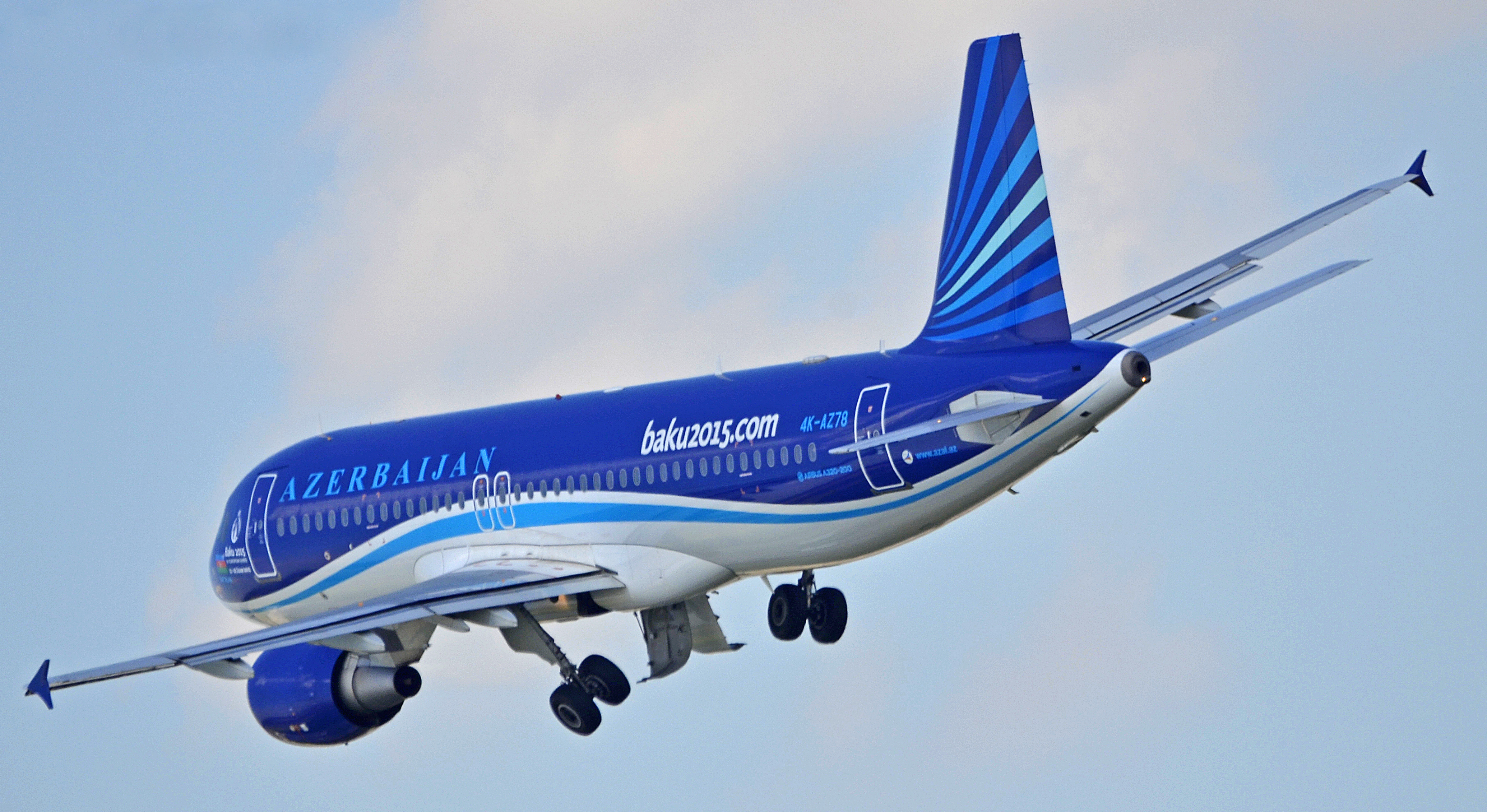 Подробнее здесь